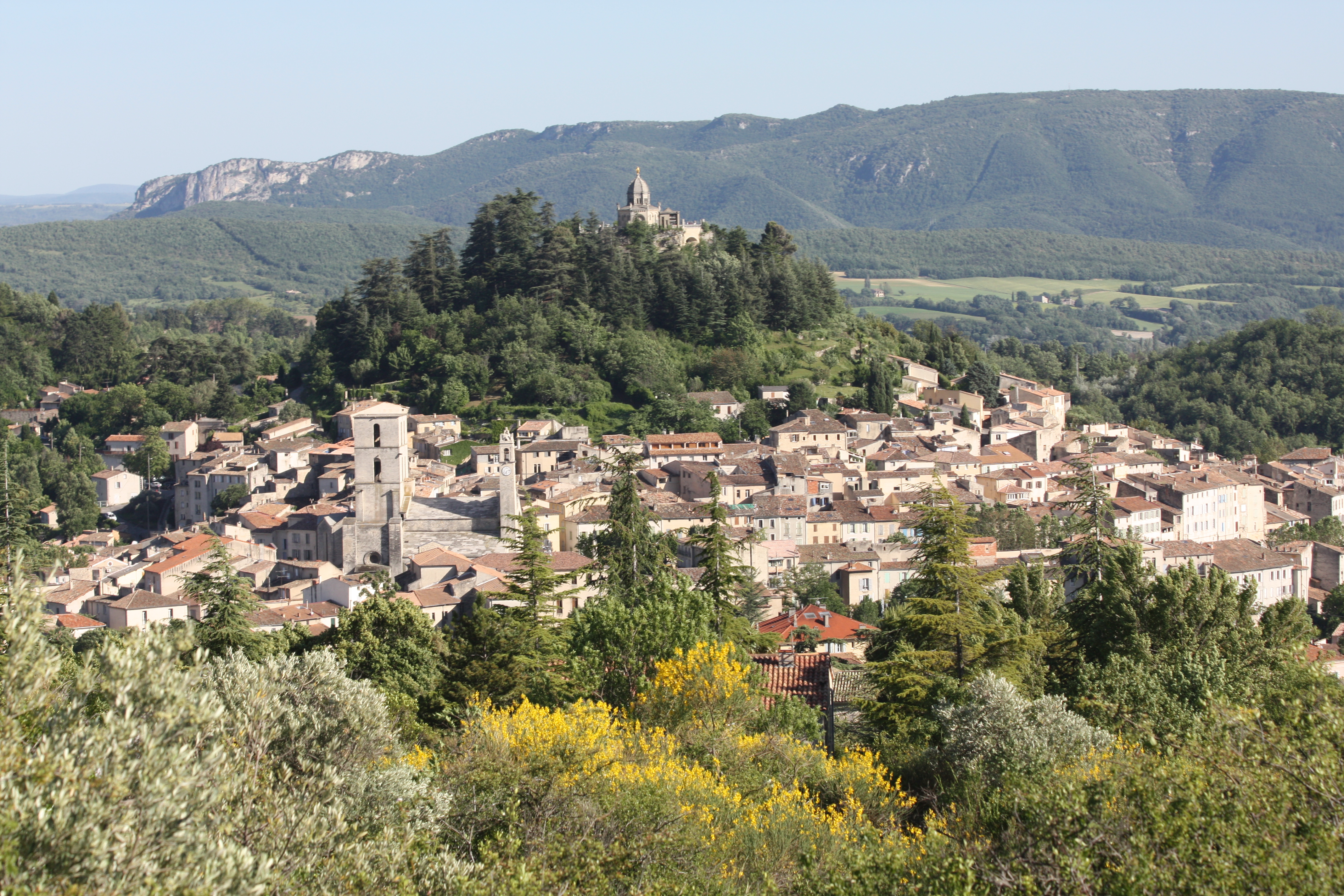 Vue de Forcalquier (premier plan) et du Luberon (deuxième plan)